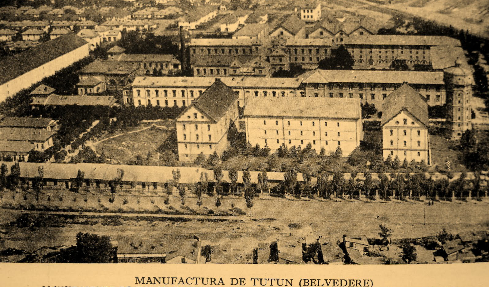 Manufactura de tutun a Regiei Monopolurilor Statului, București, România, aşa cum apare într-o carte poştală de la începutul secolului XX